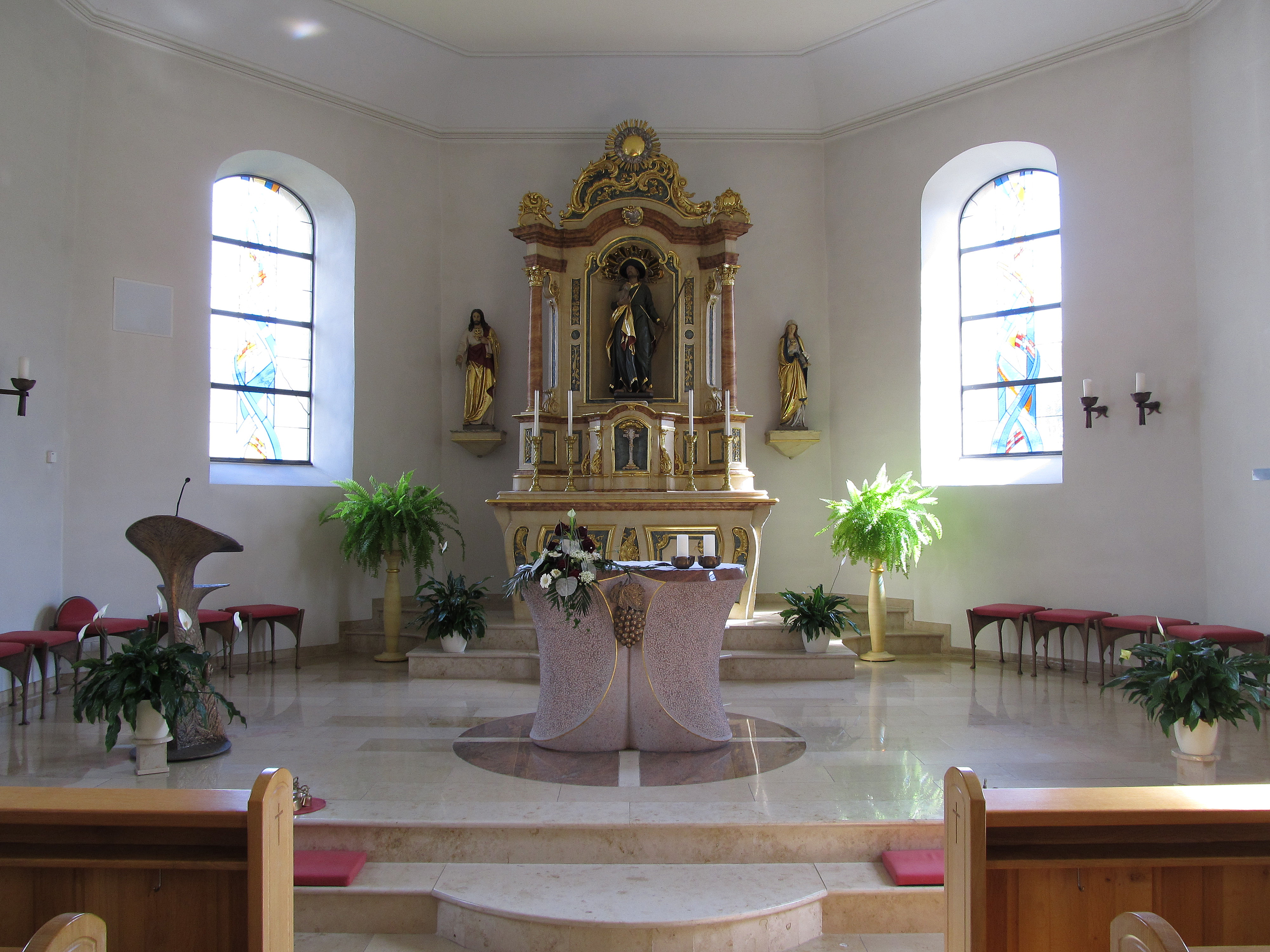 Altarraum der katholischen Pfarrkirche St. Wendelinus in Bliesdalheim, Gemeinde Gersheim, Saarland